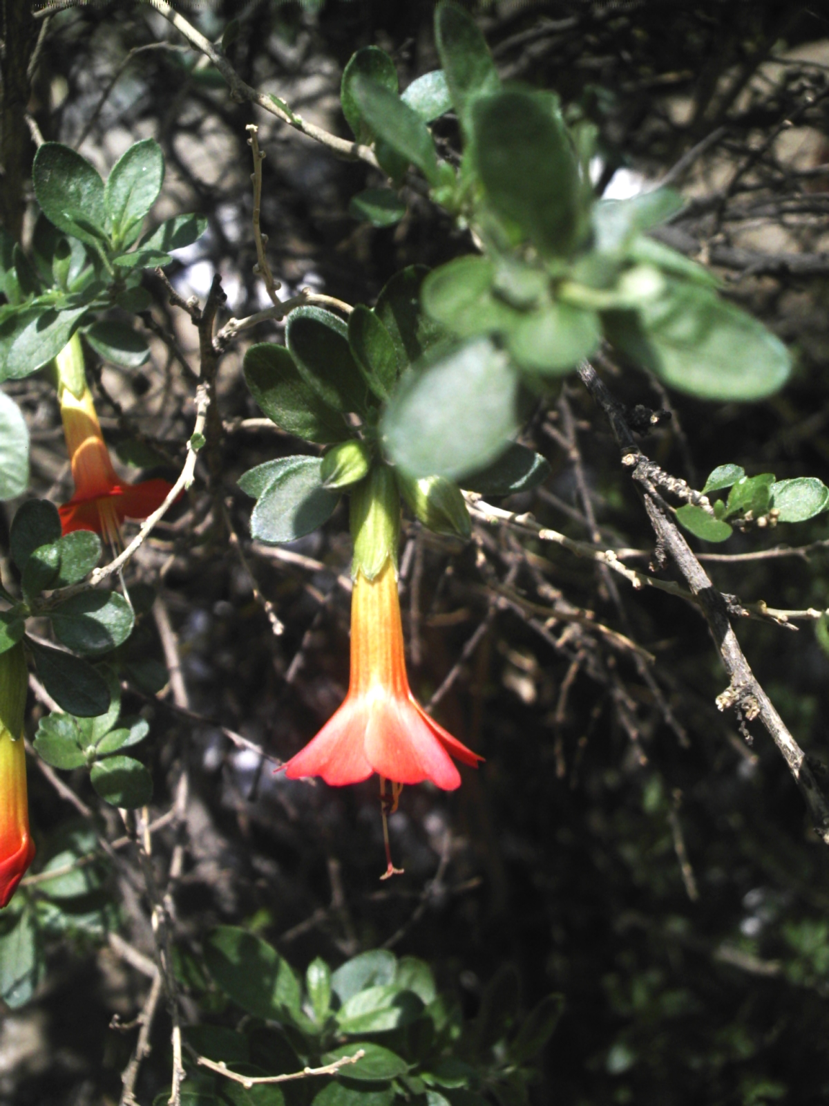 Cantua buxifolia Esta es la flor nacional de Bolivia, tiene los colores rojo , amarillo y verde igual que su bandera.